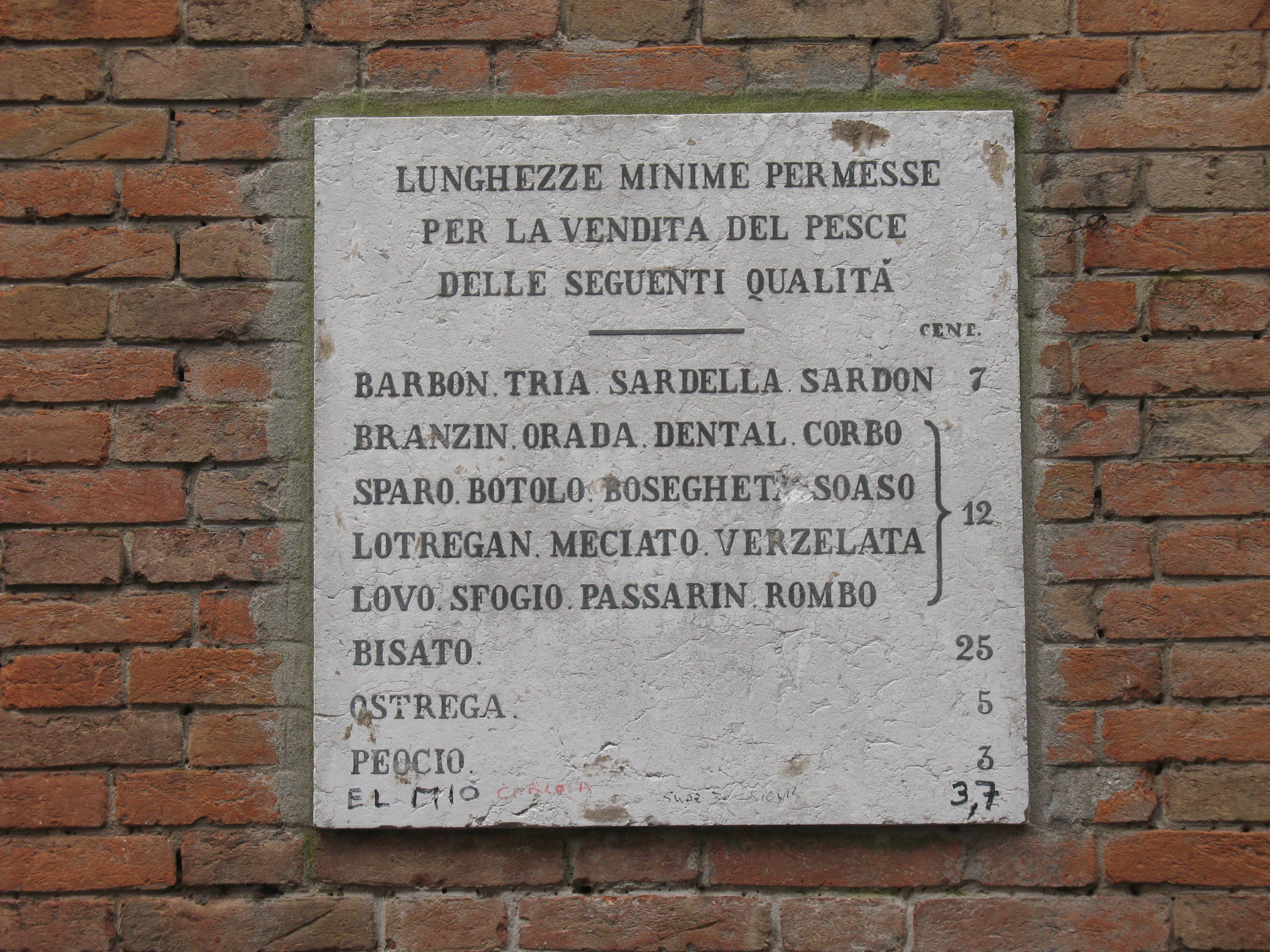 Tafel am Fischmarkt von Rialto mit den vorgeschriebenen Mindestfischgrößen